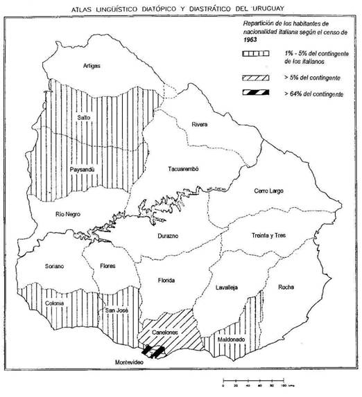 Repartición de los habitantes de nacionalidad italiana según el censo de 1963